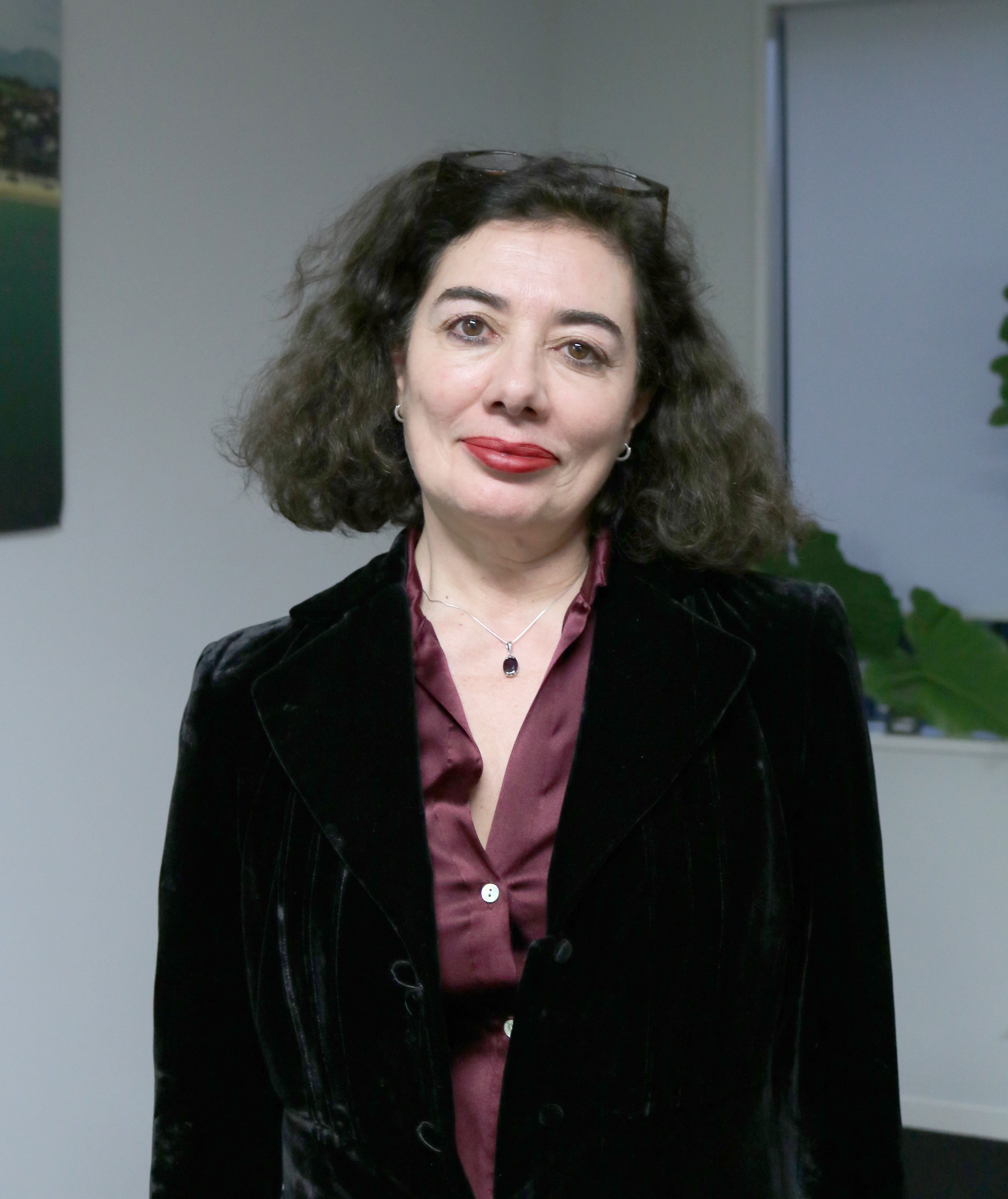 Chus